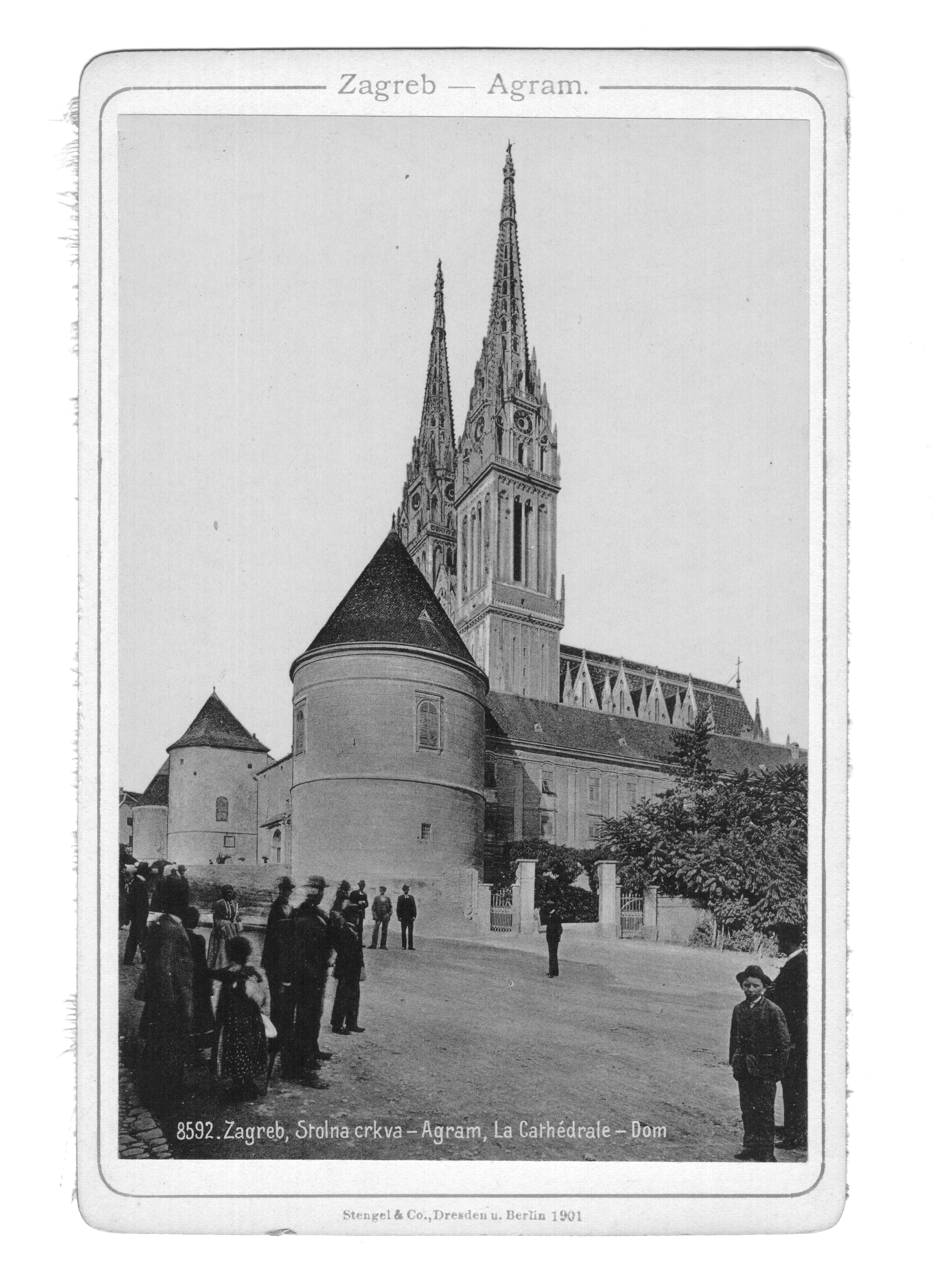 Osztrák-Magyar Monarchia, Zágráb. A Zágráb című fényképalbum 20, fehér kartonsorozatra ragasztott, fehér vászonnal összefűzött fényképéből.